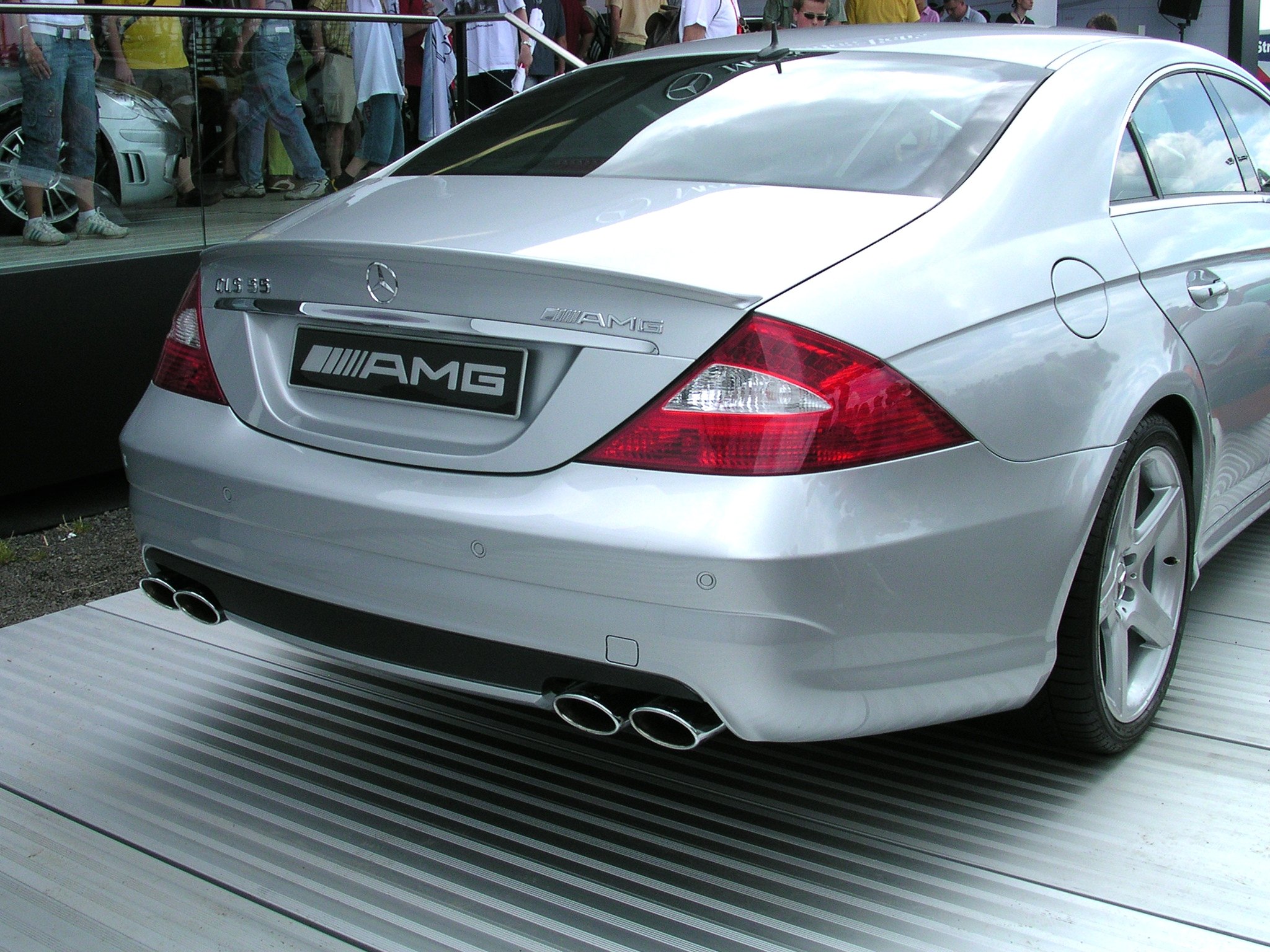 Mercedes CLS 55 AMG at the Deutsche Tourenwagen Masters 2005 in Oschersleben/Germany.